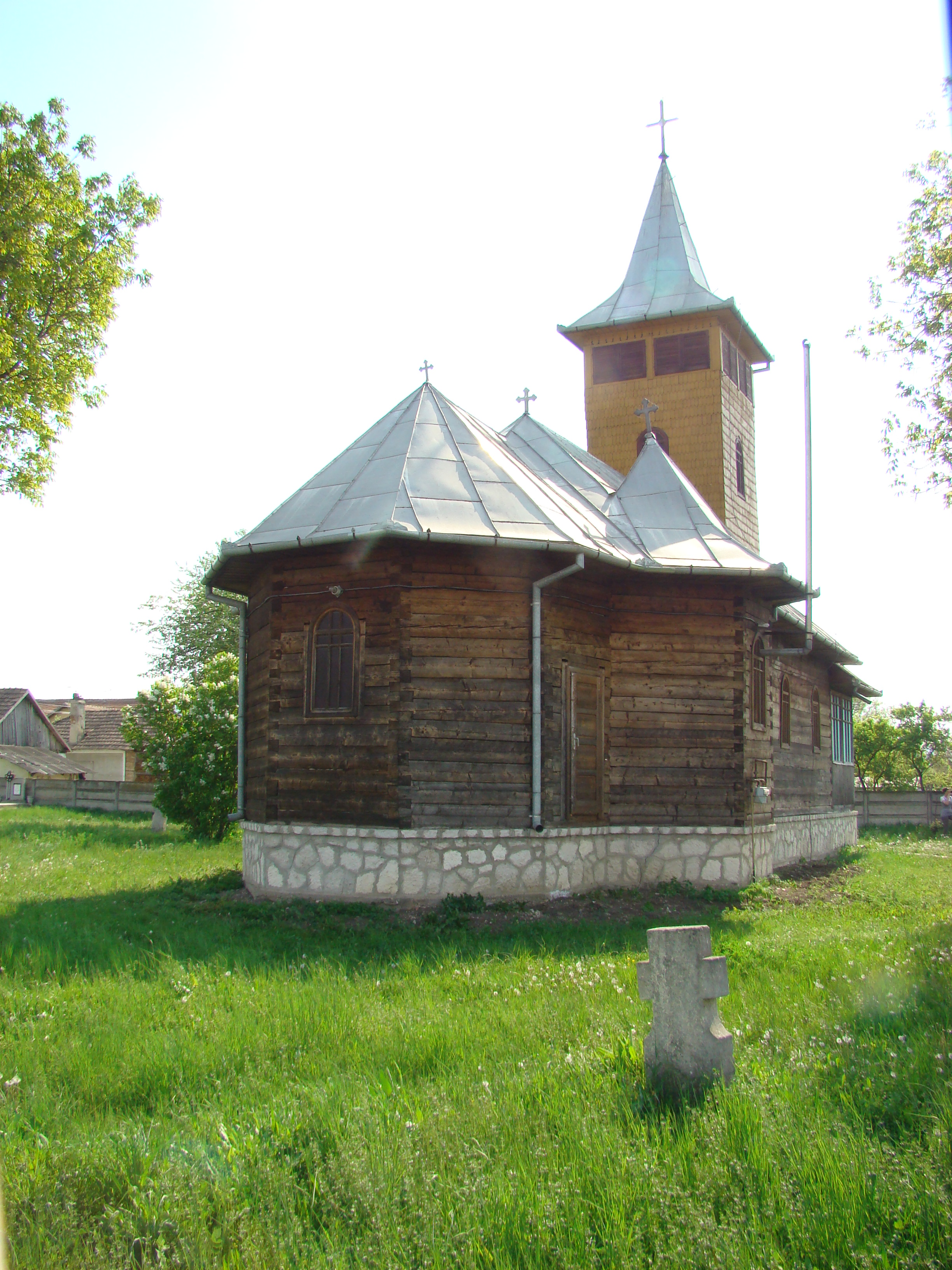 Biserica de lemn din Cisteiu de Mureş, Alba